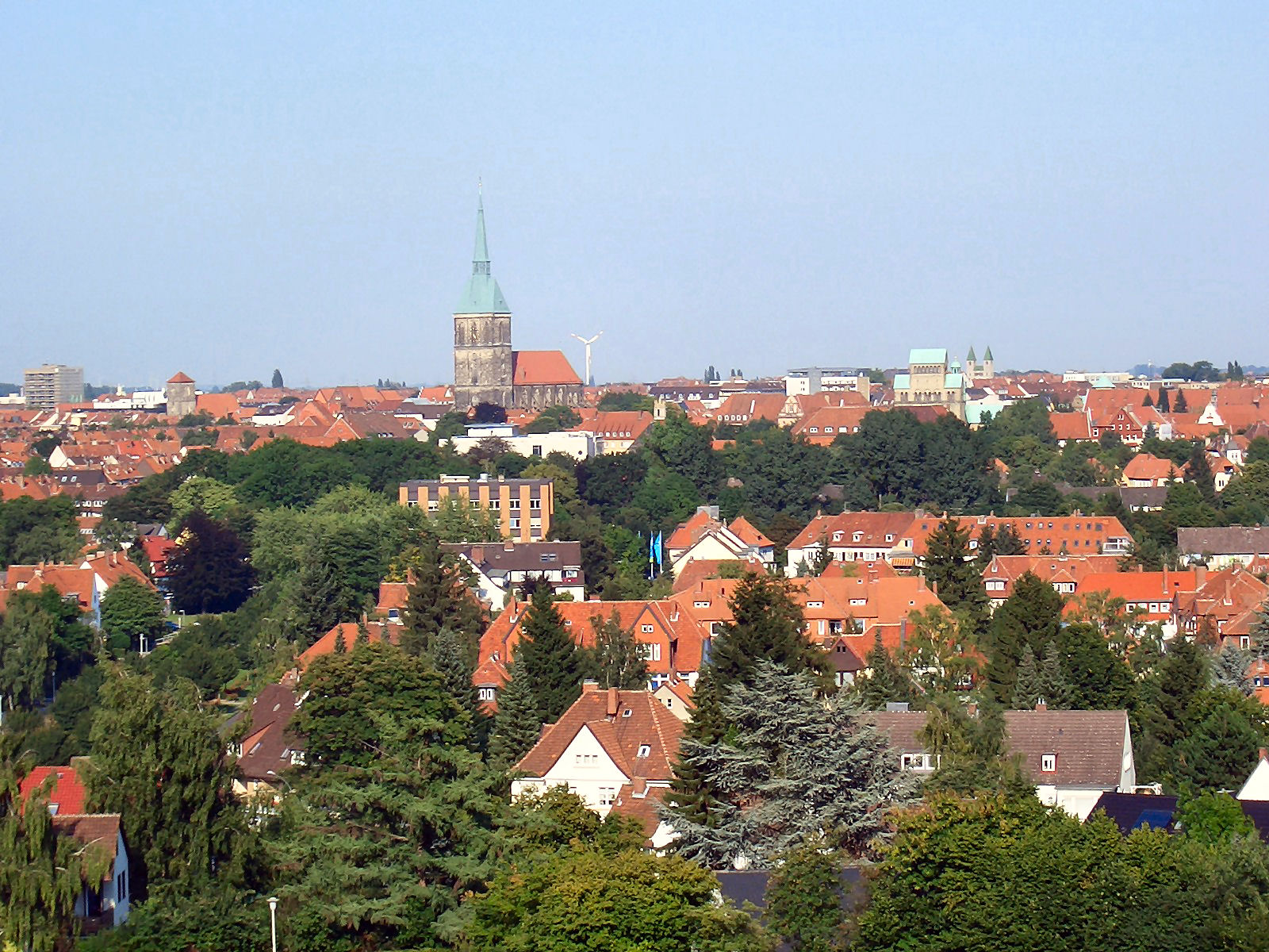 Blick auf Hildesheim vom Berghölzchen